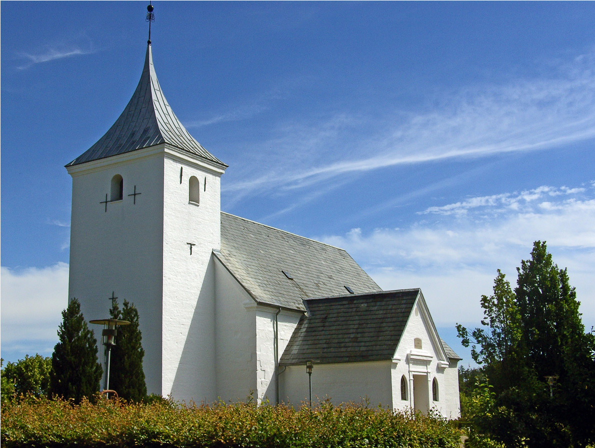 fra sydvest